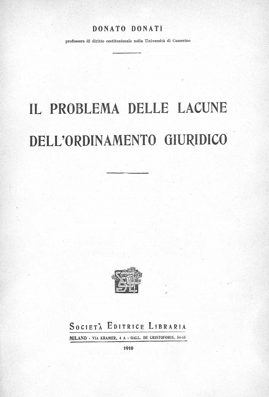 Frontespizio